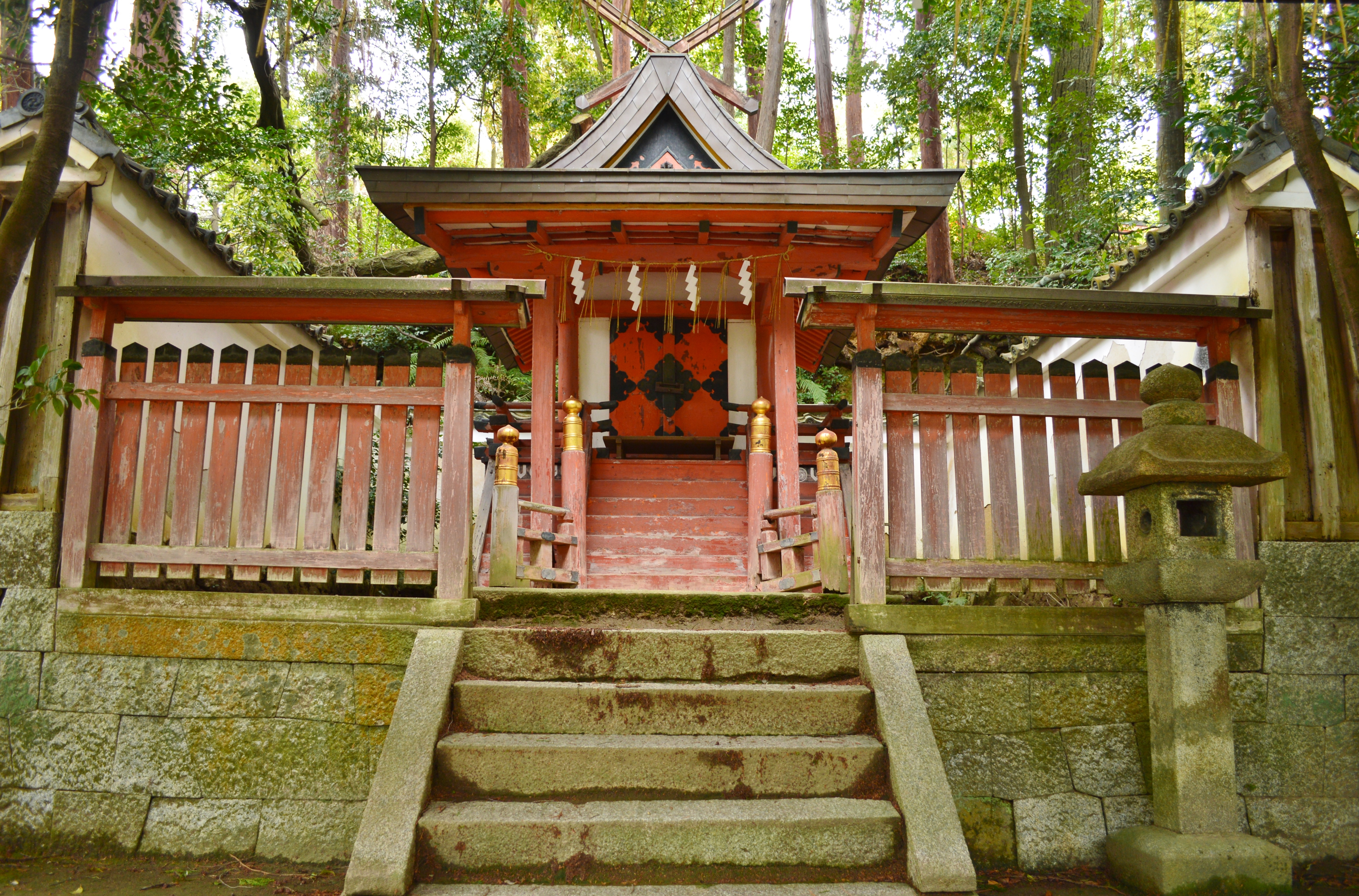 吉田神社 (京都市) 境内若宮社 Nikon D3200